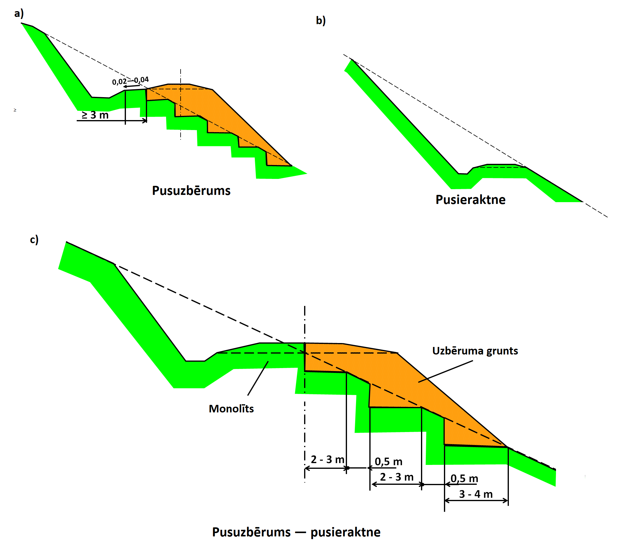 Pusieraktne - pusuzberums